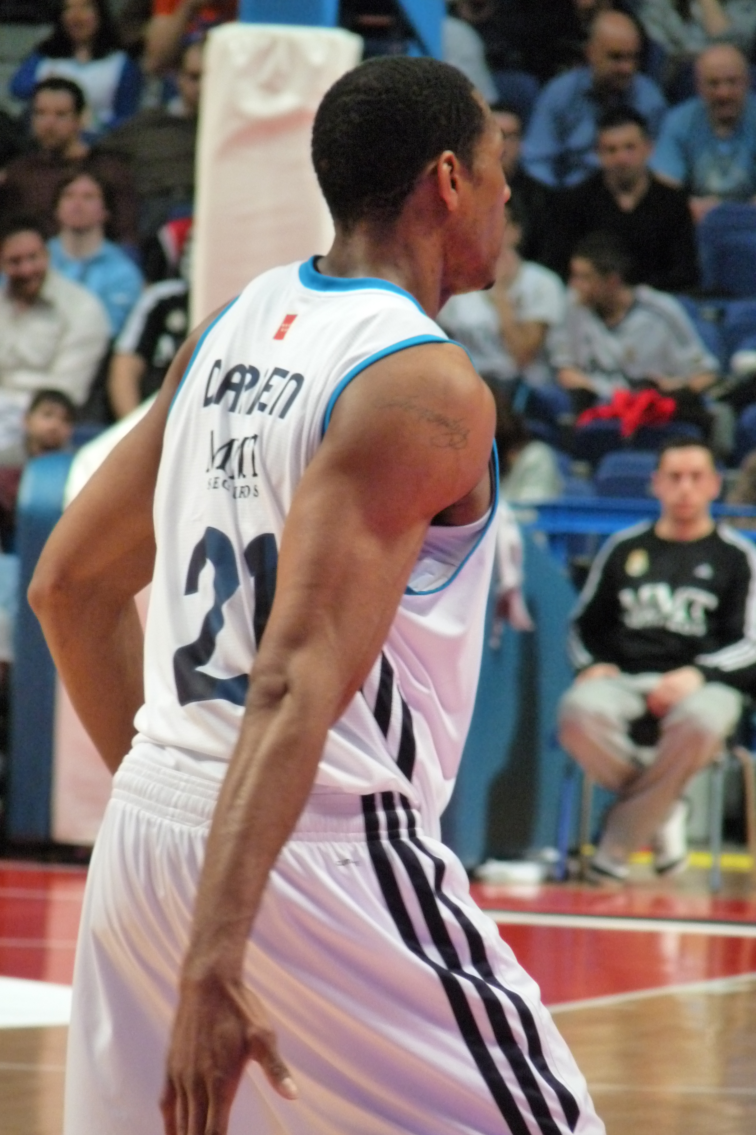 Tremmell Darden